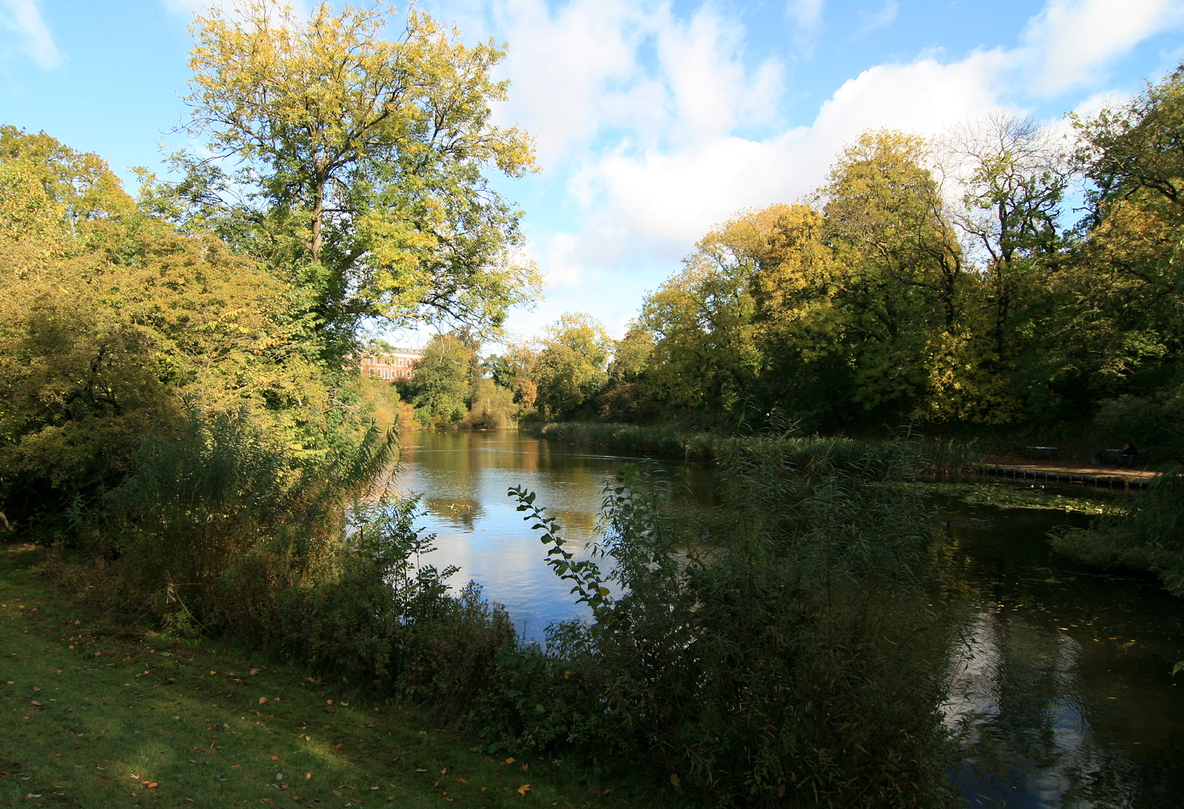 Østre Anlæg, Copenhagen.